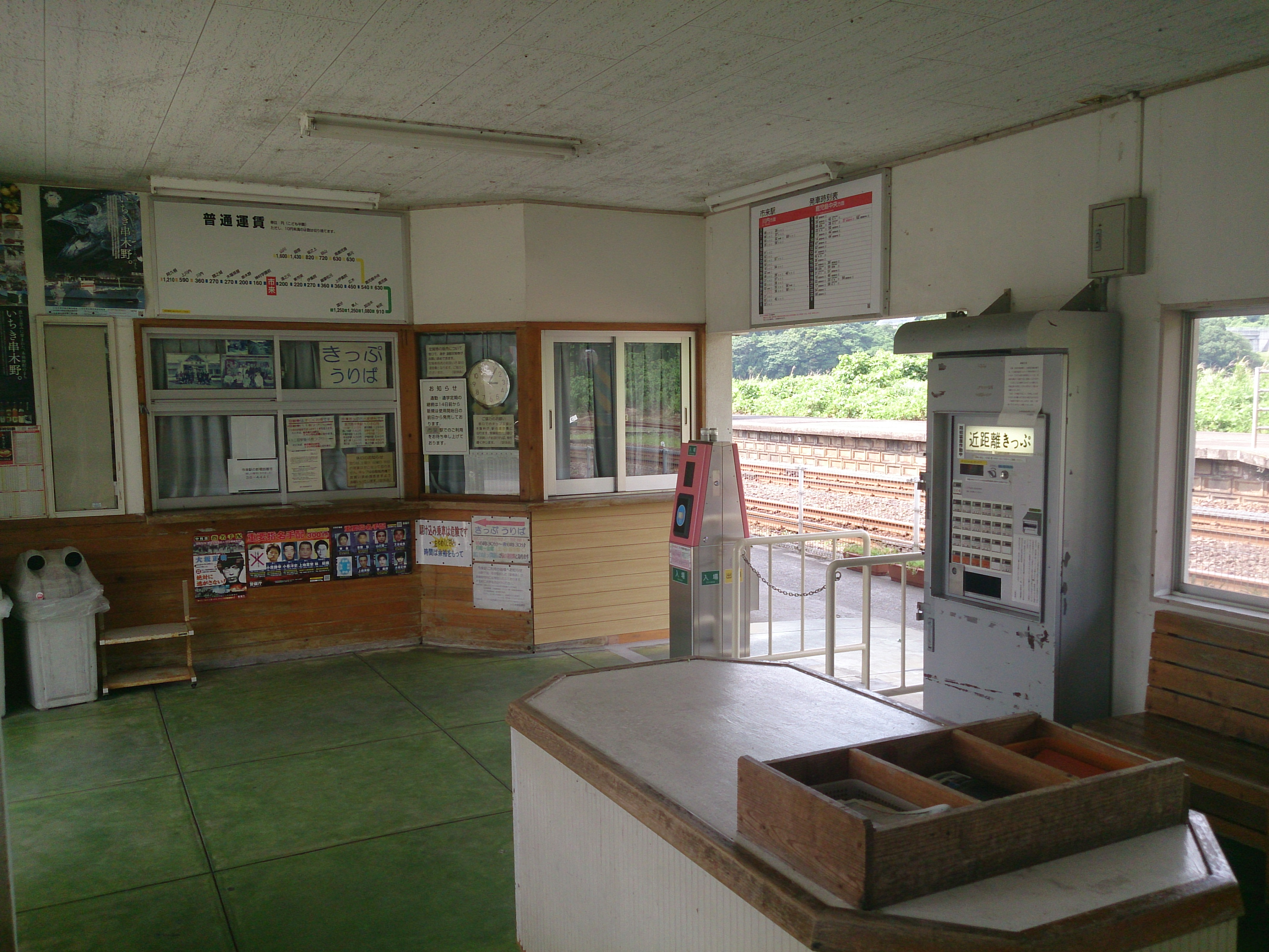 市来駅駅舎内